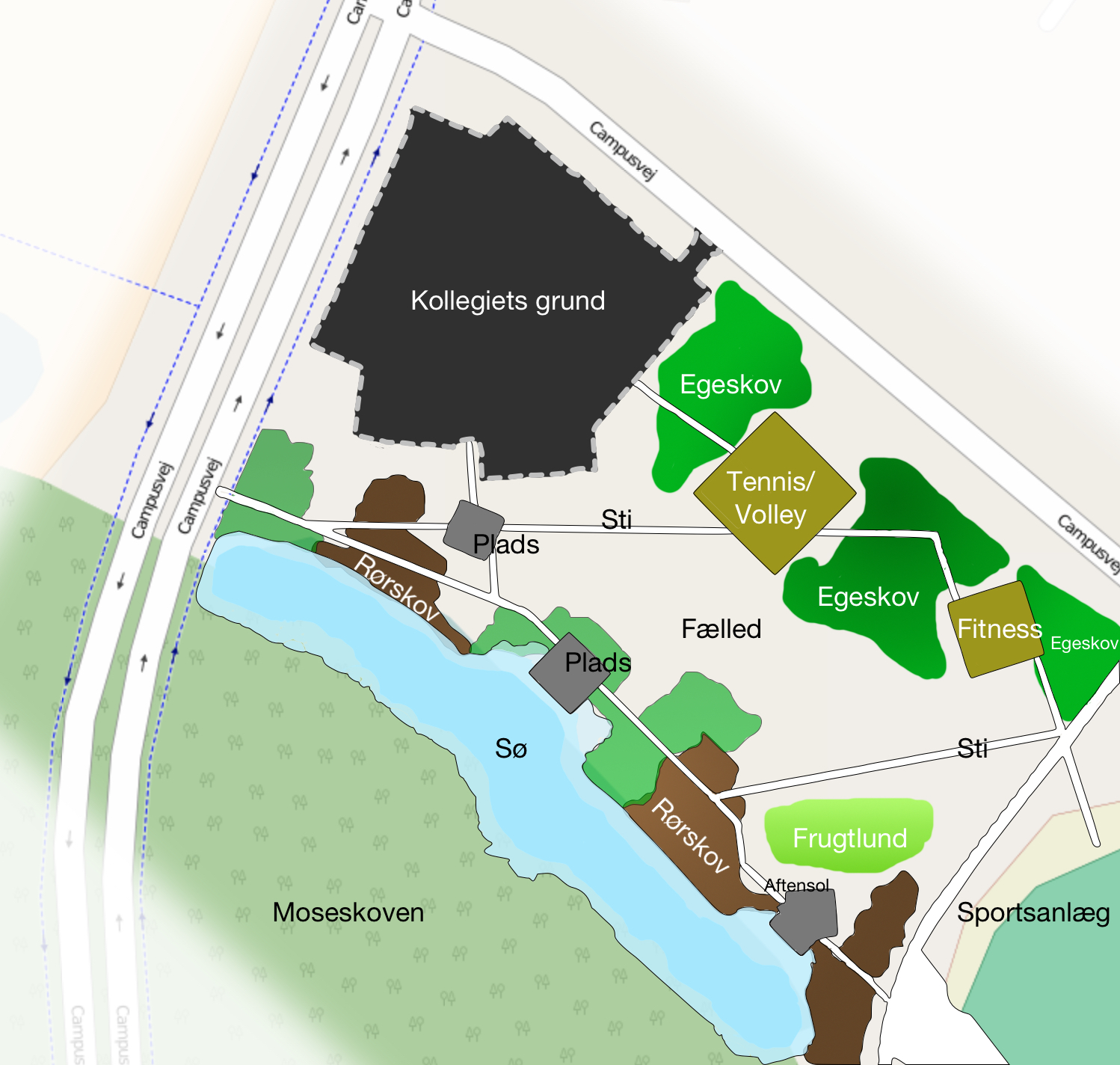 Oversigt over den kommende park. Campus Kollegiets Park.